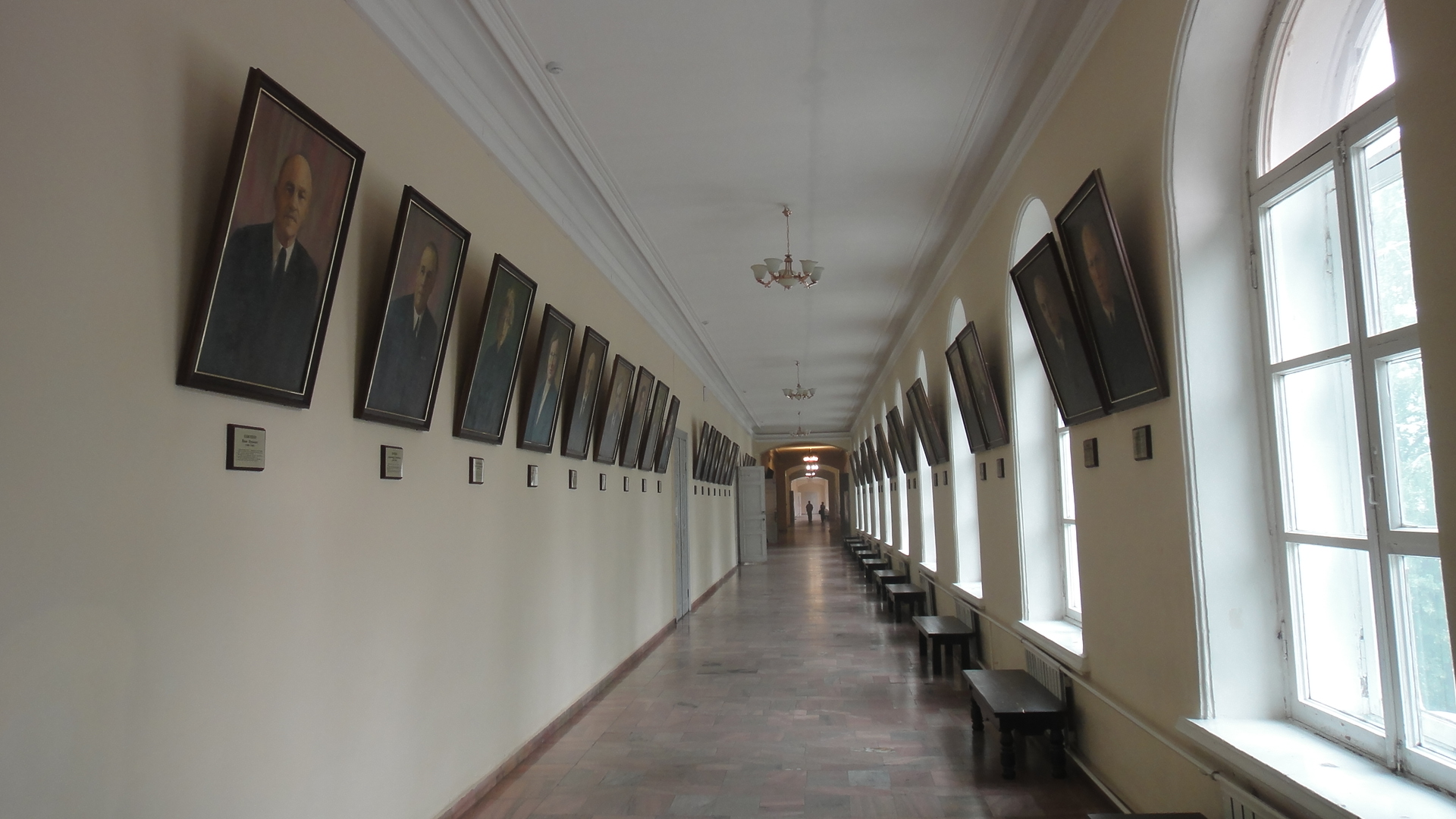 Галерея почетных профессоров ТГУ